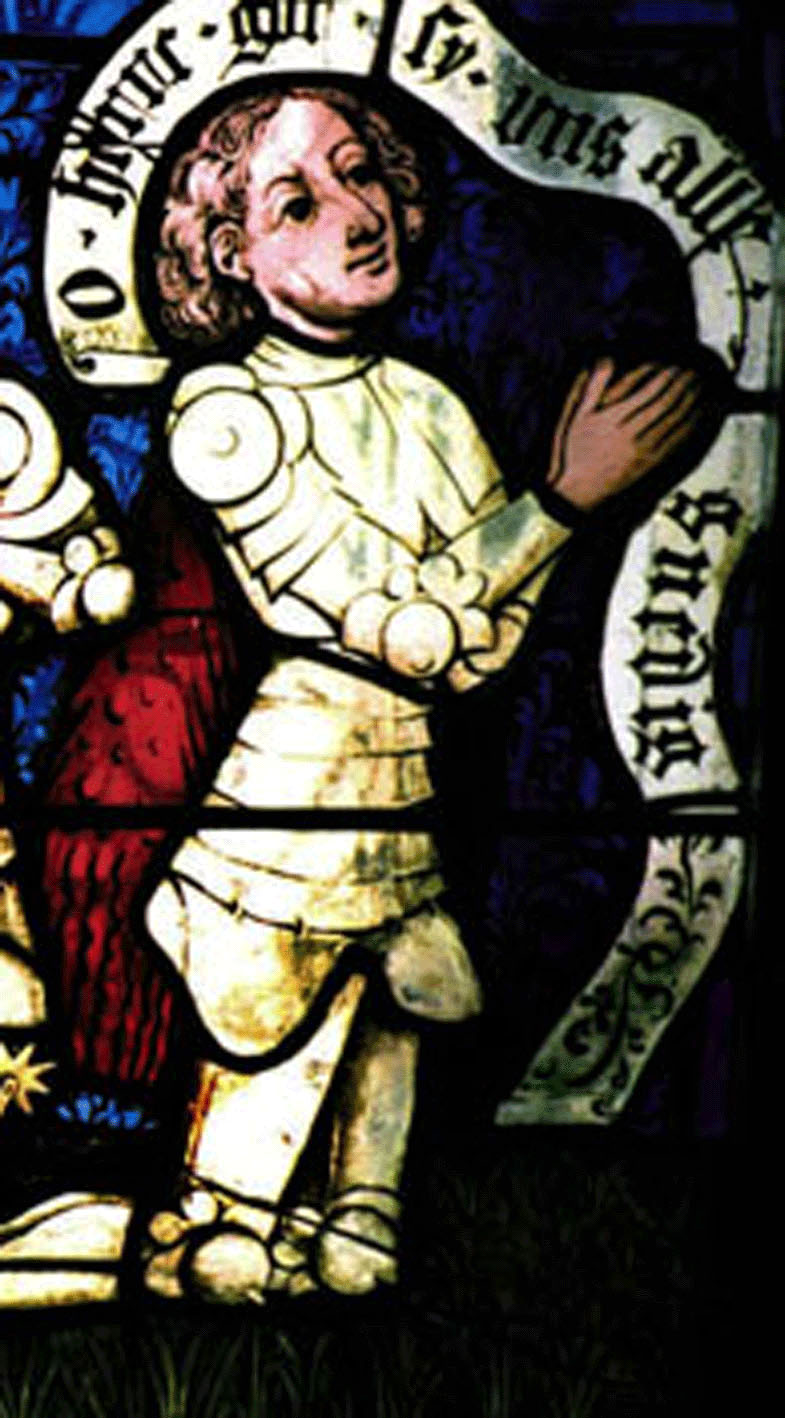 Ritter Cuno von Pyrmont und Ehrenberg. Detail. Glasmalerei des 15. Jahrhunderts. Bis Anfang 19. Jh. in einem Stifterfenster der Karmeliterkirche von Boppard am Rhein. Seit Anfang 20. Jh. "Sommerhaus" der ehem. Ogden Goelet Villa, Newport/USA, heute katholische Salve-Regina-University.